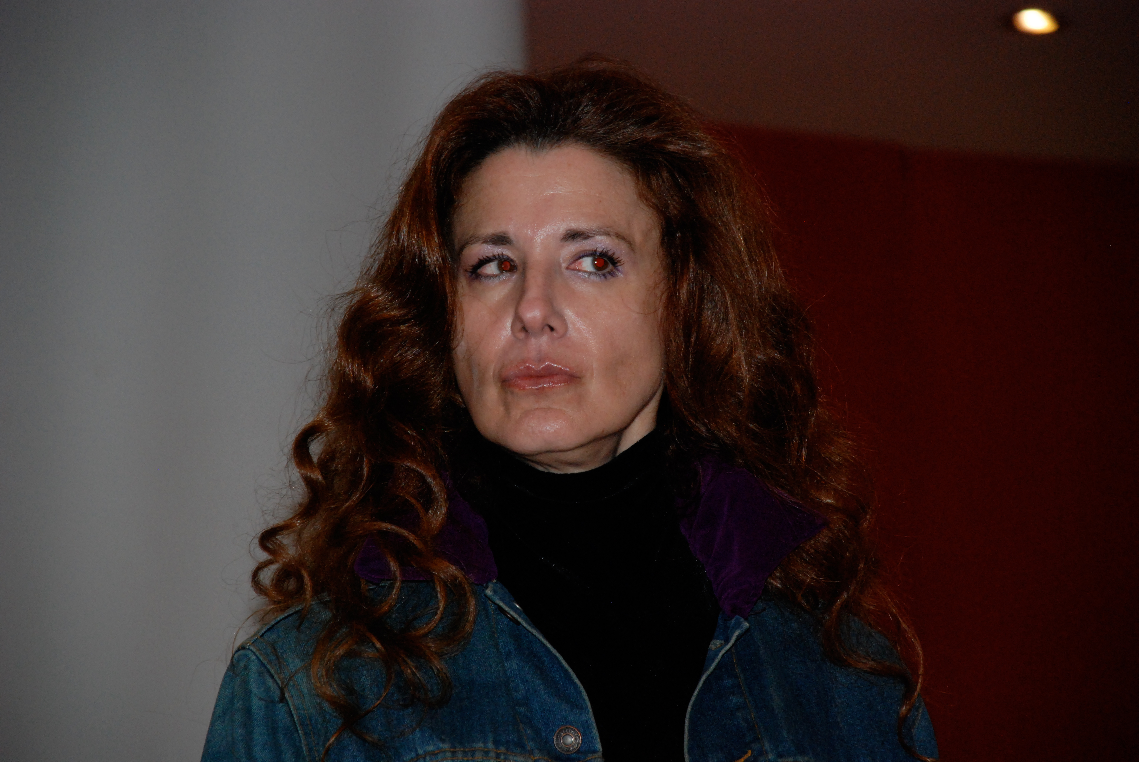 Suzie Plakson